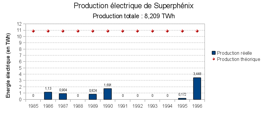 Production électrique du réacteur à neutrons rapides Français Superphénix. Production d'électricité théorique avec un facteur de charge de 100% : 10,86 TWh par an Facteur de charge moyen 1985-1996 : 6,3% Production d'électricité totale 1985-1996 : 8,209 TWh Sources : EDF-NERSA via Wise-Paris